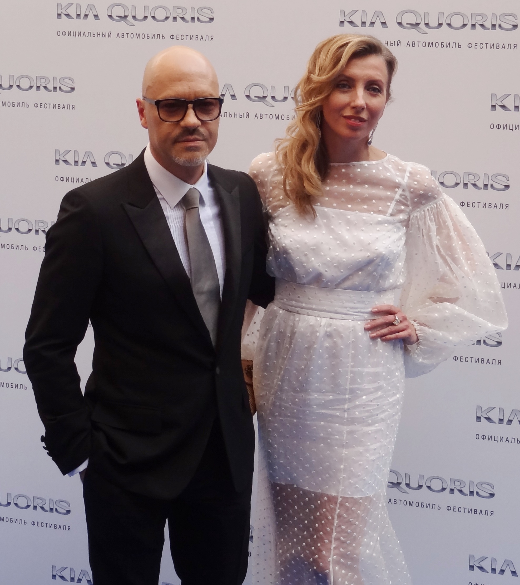 Федор и Светлана Бондарчук на церемонии открытия фестиваля "Кинотавр - 2013" в Сочи.